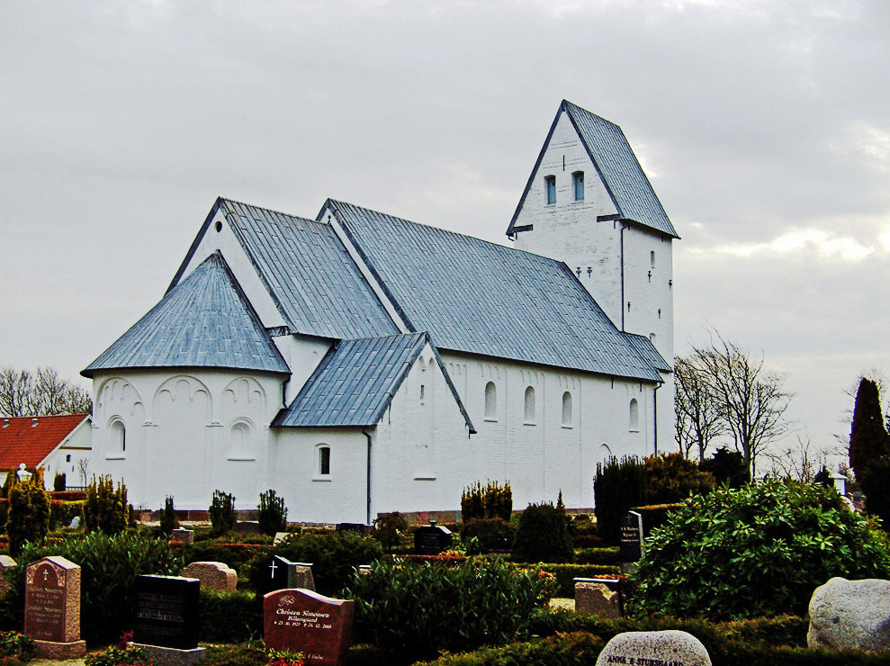 fra nordøst